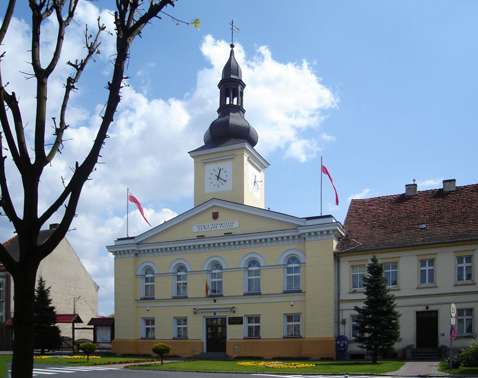 Ratusz w Babimoście. Zabytek nr rej. 1929 z 21.04.1971.